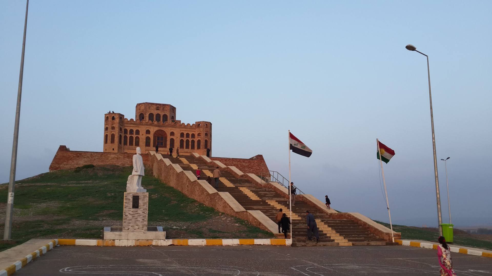 Kurdî: حەوشی قەڵای شێروانە